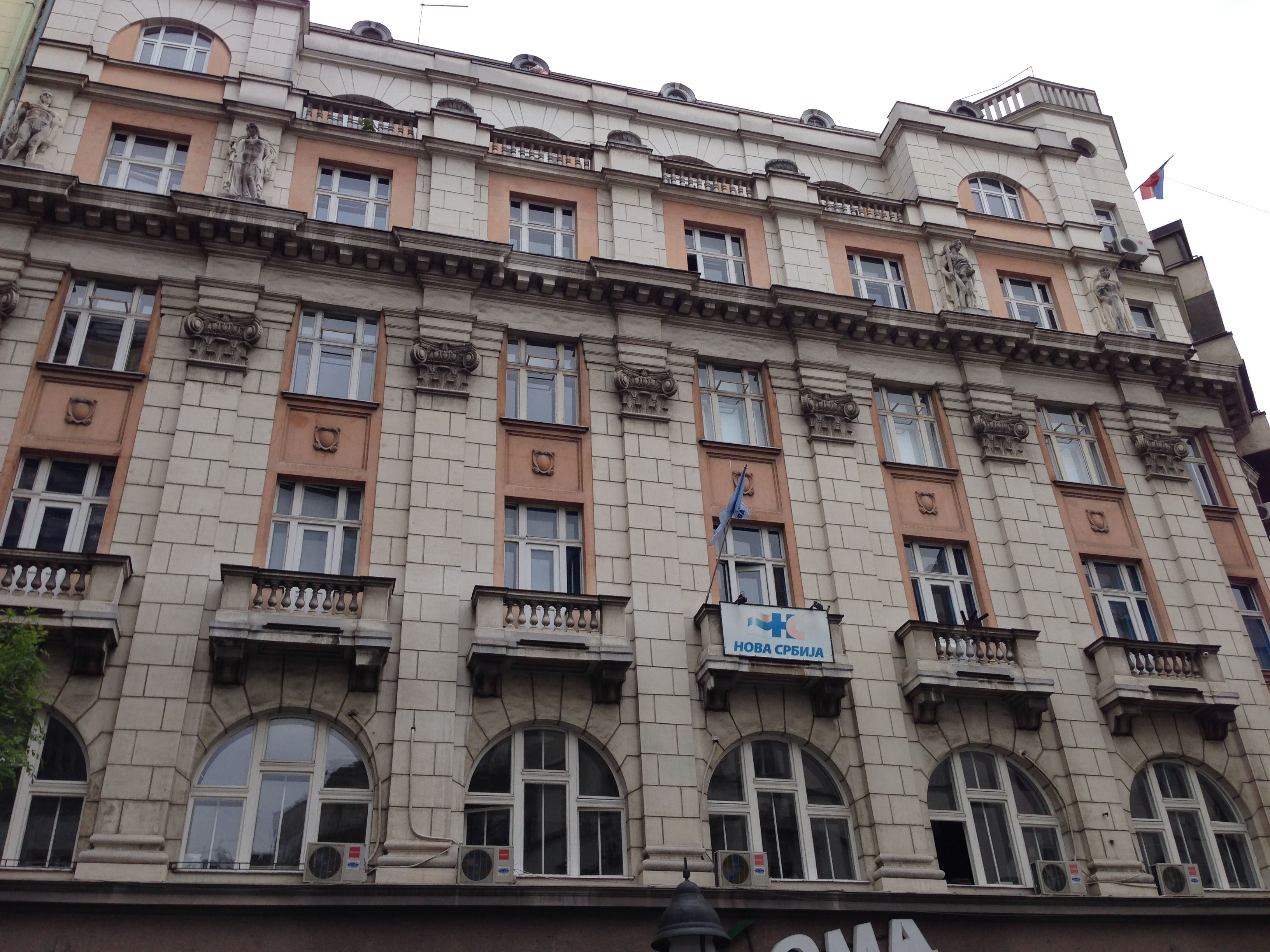 Sedište i zatvor Specijalne policije (1941-1944), Beograd, Obilićev venac 4